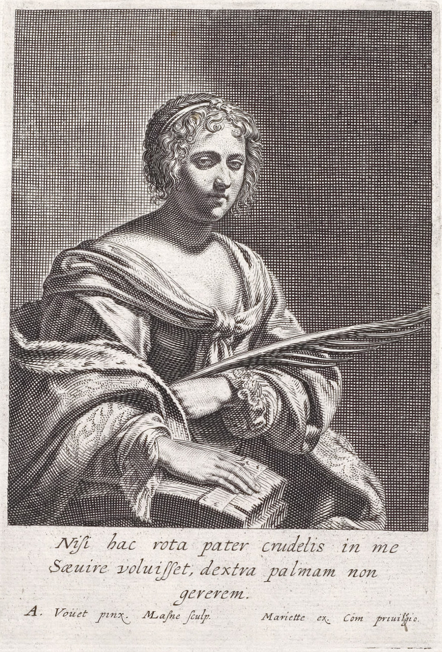 Grafik aus dem Klebeband Nr.13 der Fürstlich Waldeckschen Hofbibliothek Arolsen Reproduktion eines Gemäldes von Aubin Vouet: Die hl. Katharina "Nisi hac rota pater crudelis…"